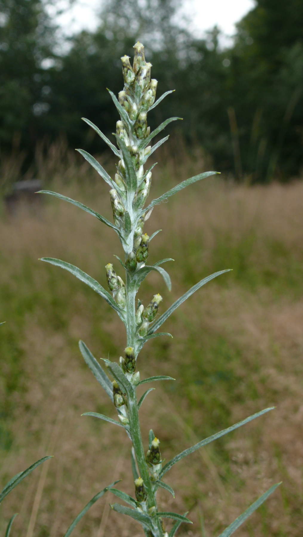 Gnaphalium sylvaticum, Schwäbisch-Fränkische Waldberge, Germany